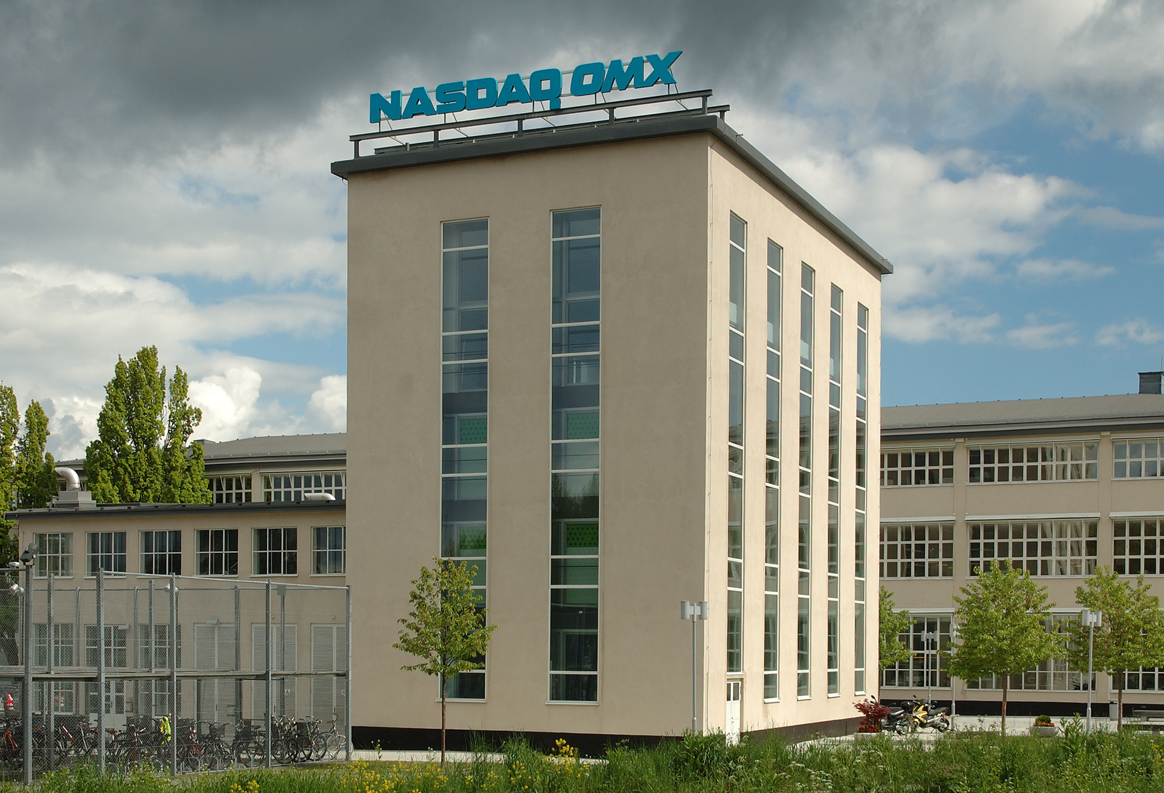 Stockholmsbörsens träningslokal "pannhuset" i Frihamnen, Stockholm. I bakgrunden skymtar den gamla Fordfabriken som utgör de kontorslokaler NasdaqOMX delar med försäkringsbolaget Salus Ansvar.